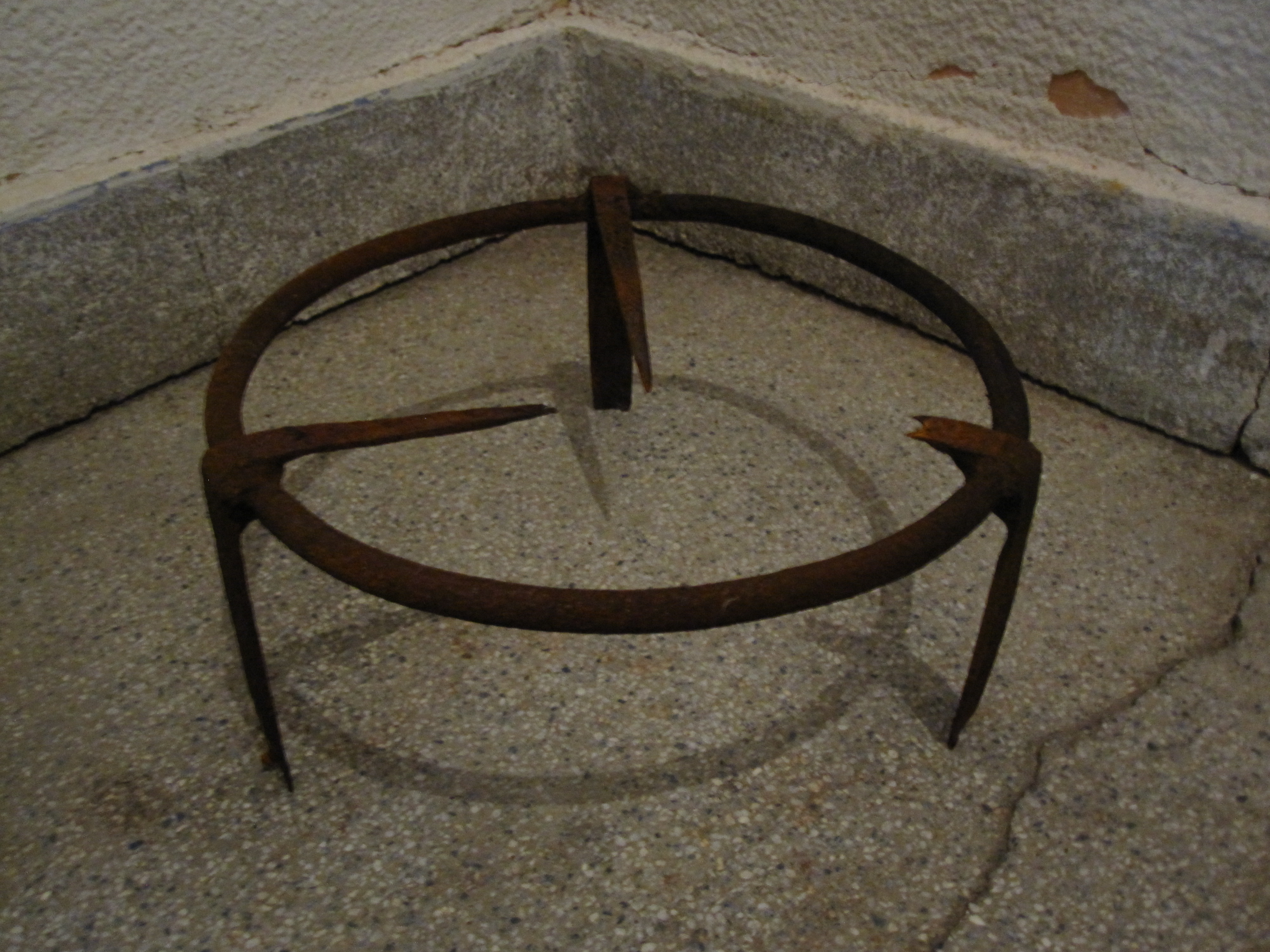 Пирустија - предмет кој служи како држач на предмети кои се ставаат на оган. Под пирустијата се гори огнот.